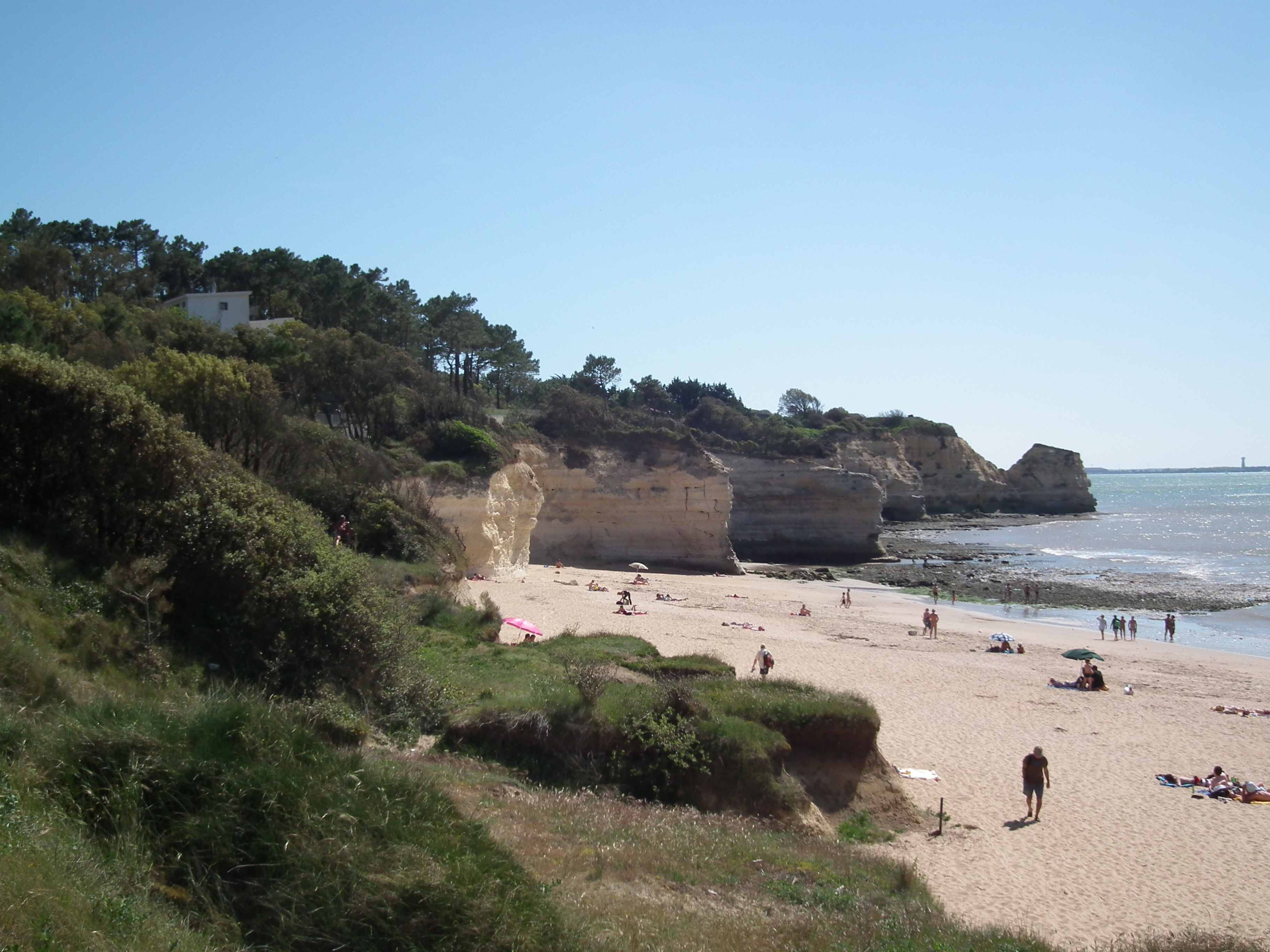 La plage de Suzac à Saint-Georges-de-Didonne